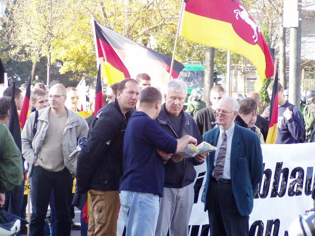 Der heutige (Stand 1. Januar 2010) niedersächsische NPD-Landesvorsitzende Adolf Dammann (mit Karte) als Organisator einer NPD-Kundgebung am 29. Oktober 2005 in Göttingen neben dem damaligen NPD-Landeschef Ulrich Eigenfeld (rechts)